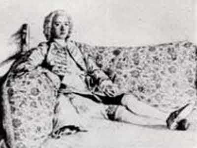 דיוקנו של לורן ד'ארבייה, איור מ-1672